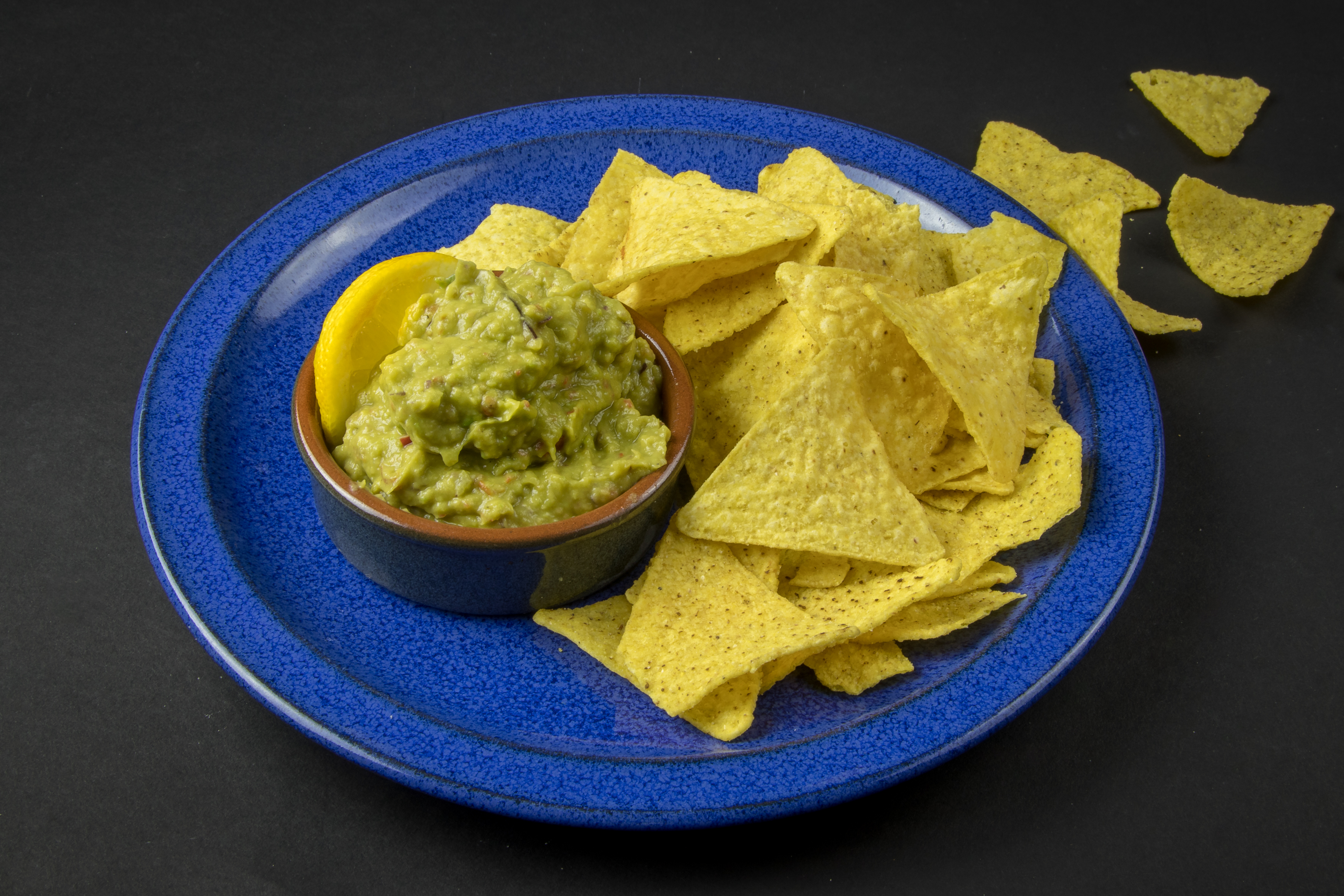 Guacamole mit Nachos